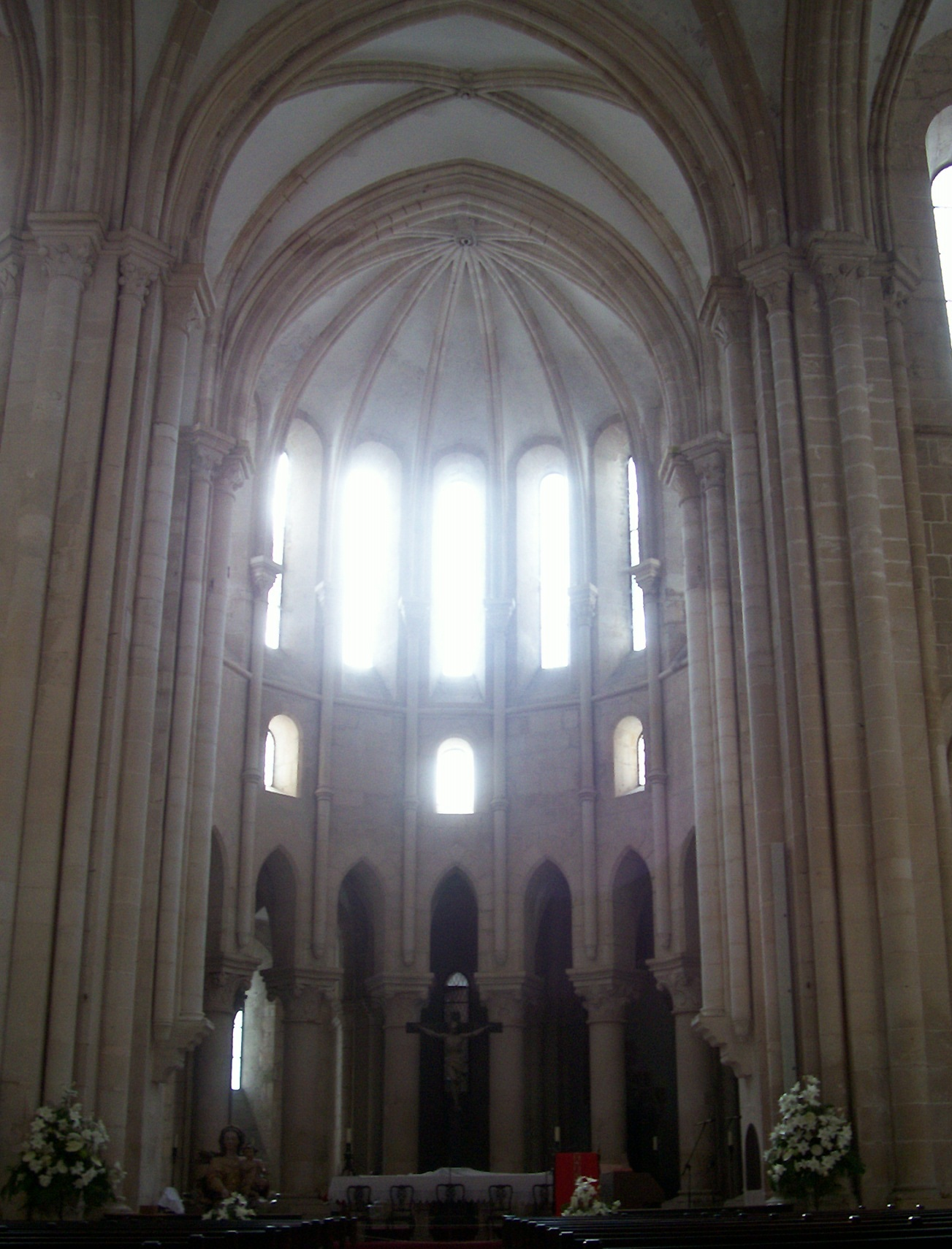 Igreja mosteiro Santa María